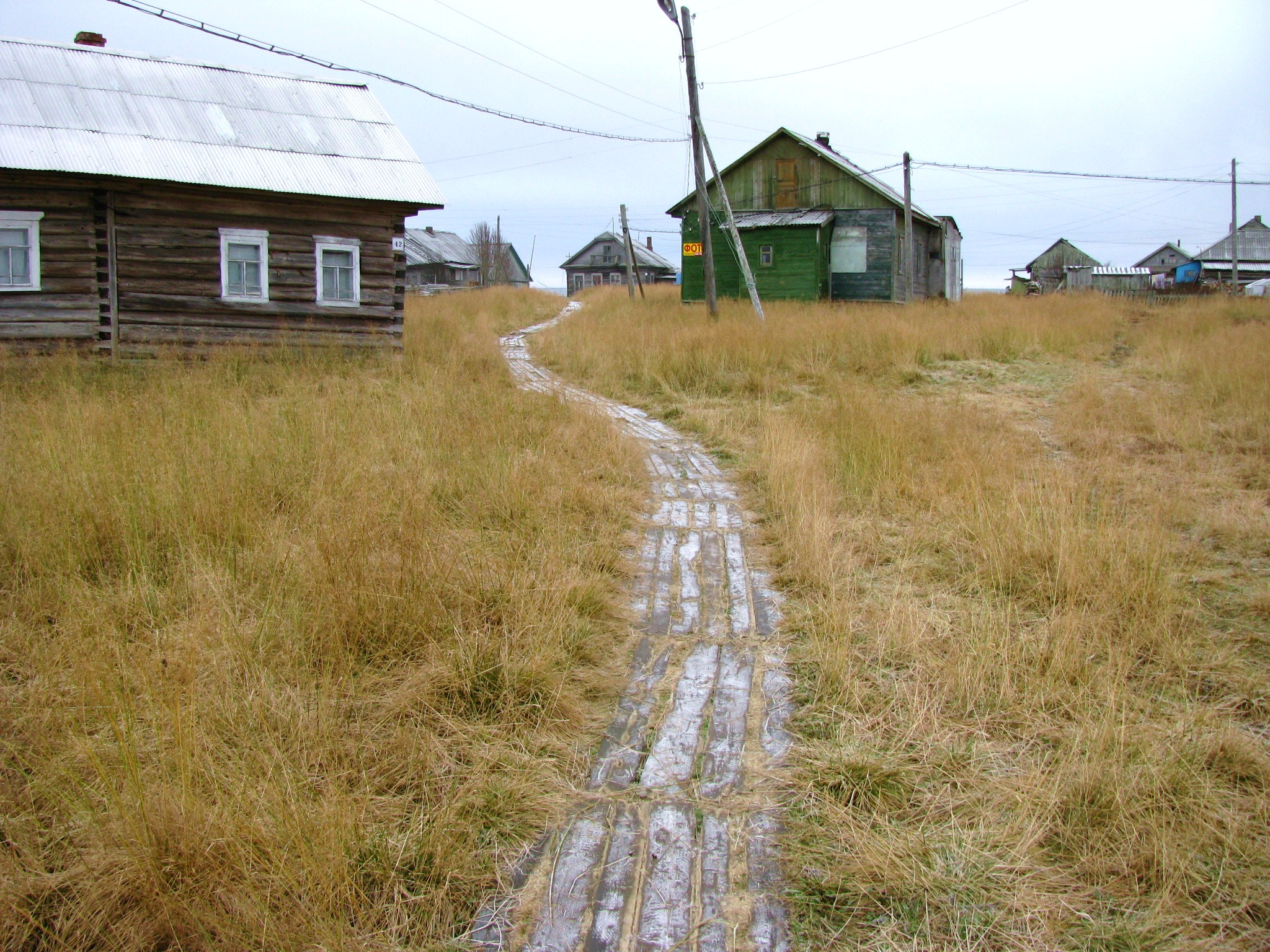 Чапома